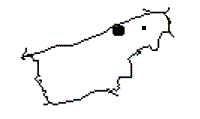 Situació de la masia de Reixac respecte de Calders (Moianès)